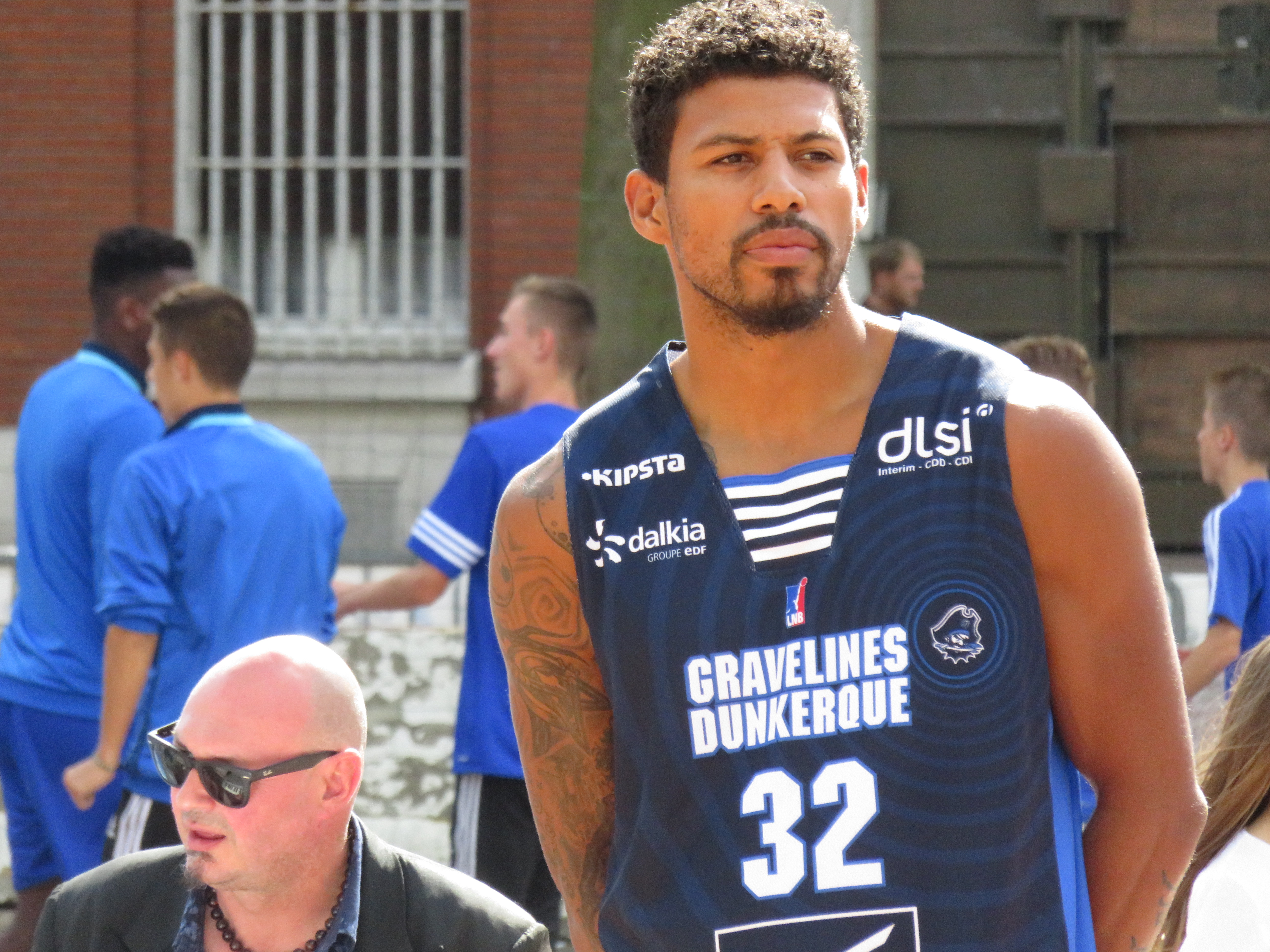 32 Steven Gray